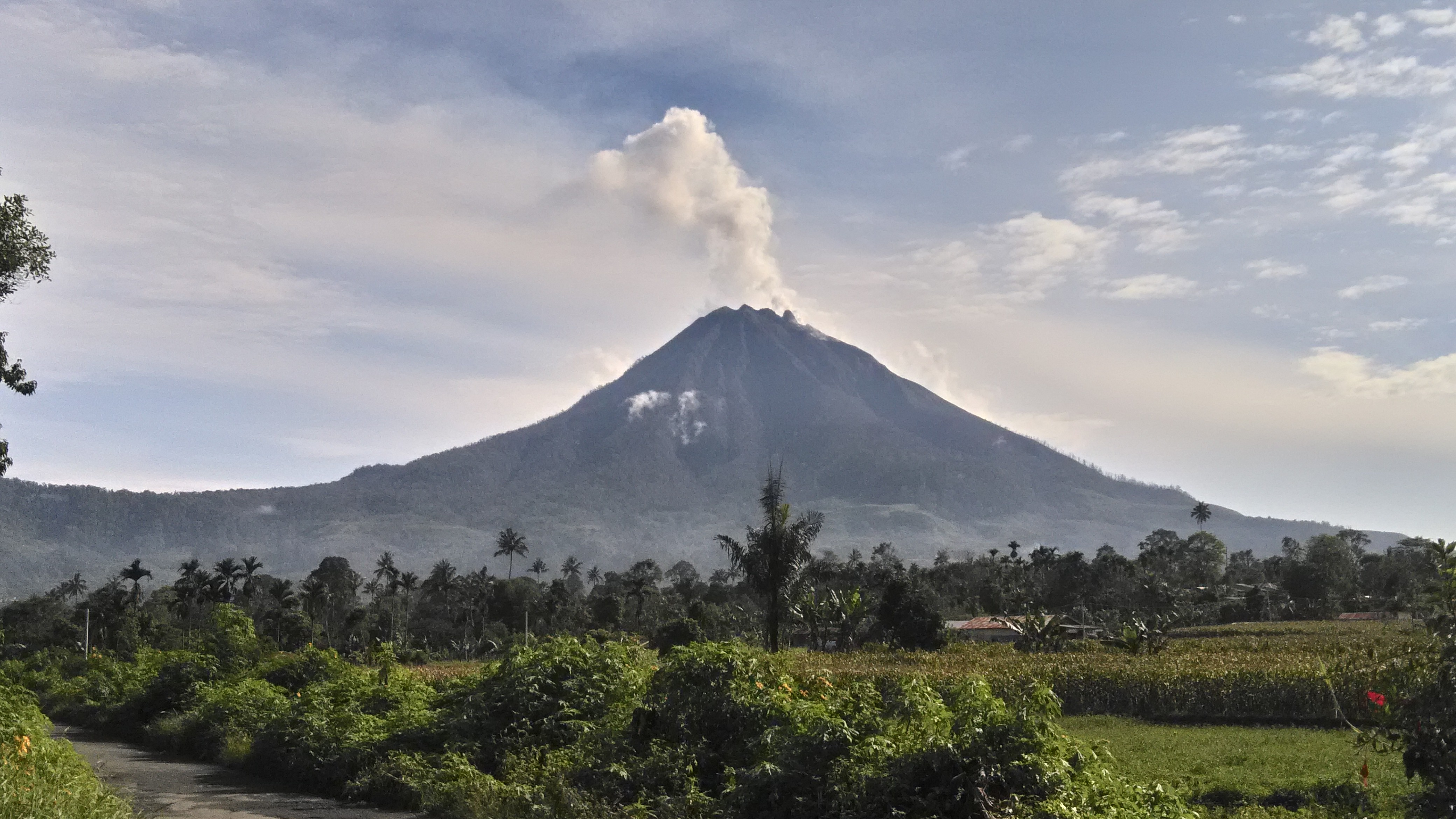 Mount Sinabung in Sumatra, Indonesia